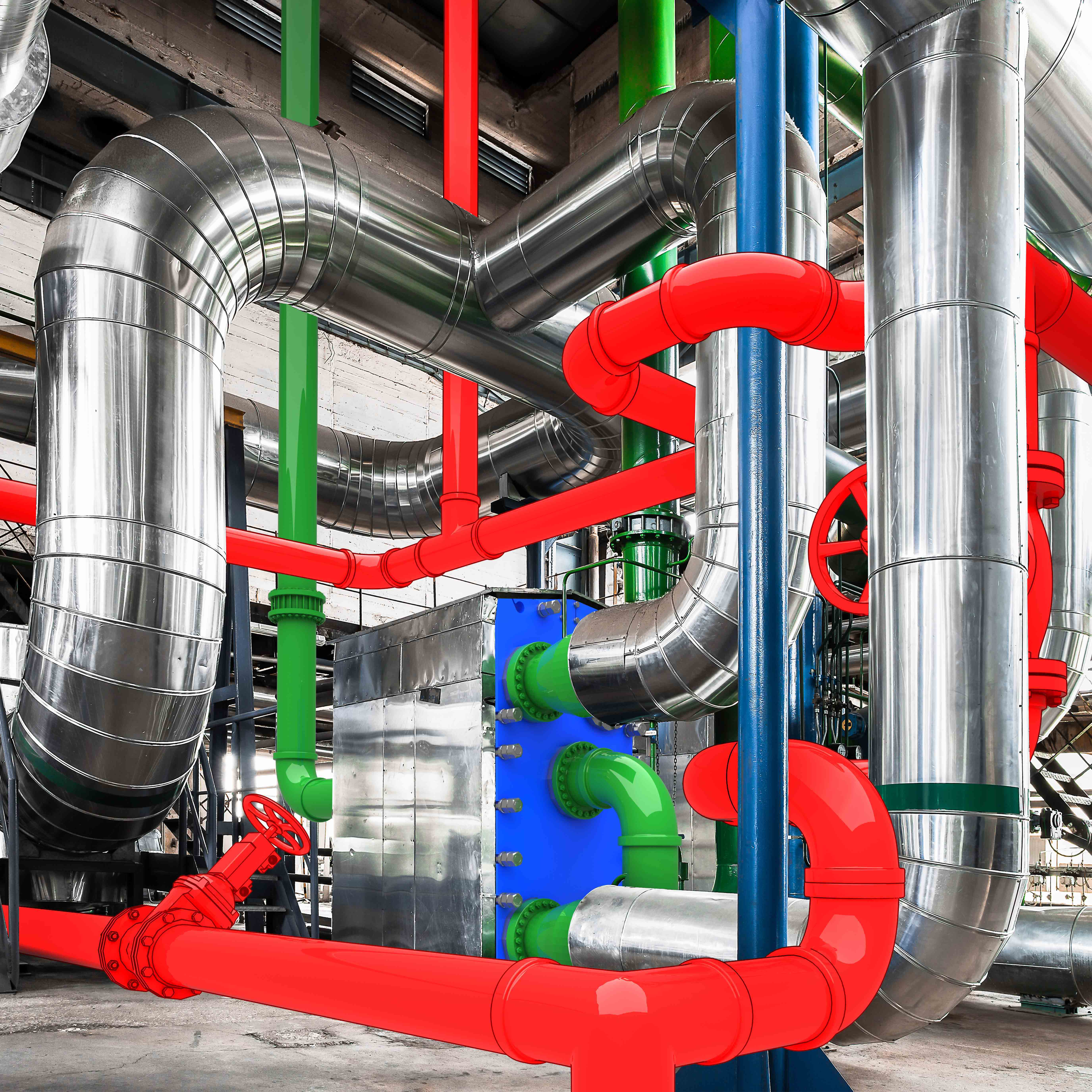 На данной иллюстрации хорошо видно, как красная труба, изображенная в системе смешанной реальности (MR), взаимодействует с реальными объектами в пространстве. Пользователь видит , что реальные объекты частично перекрывают MR-проекцию.